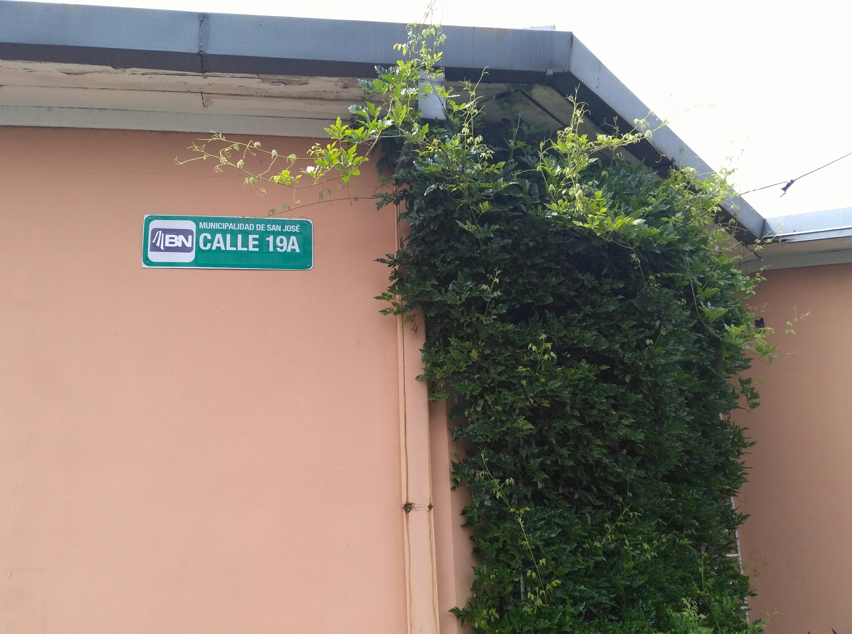 Señal de la calle 19A en San José de Costa Rica